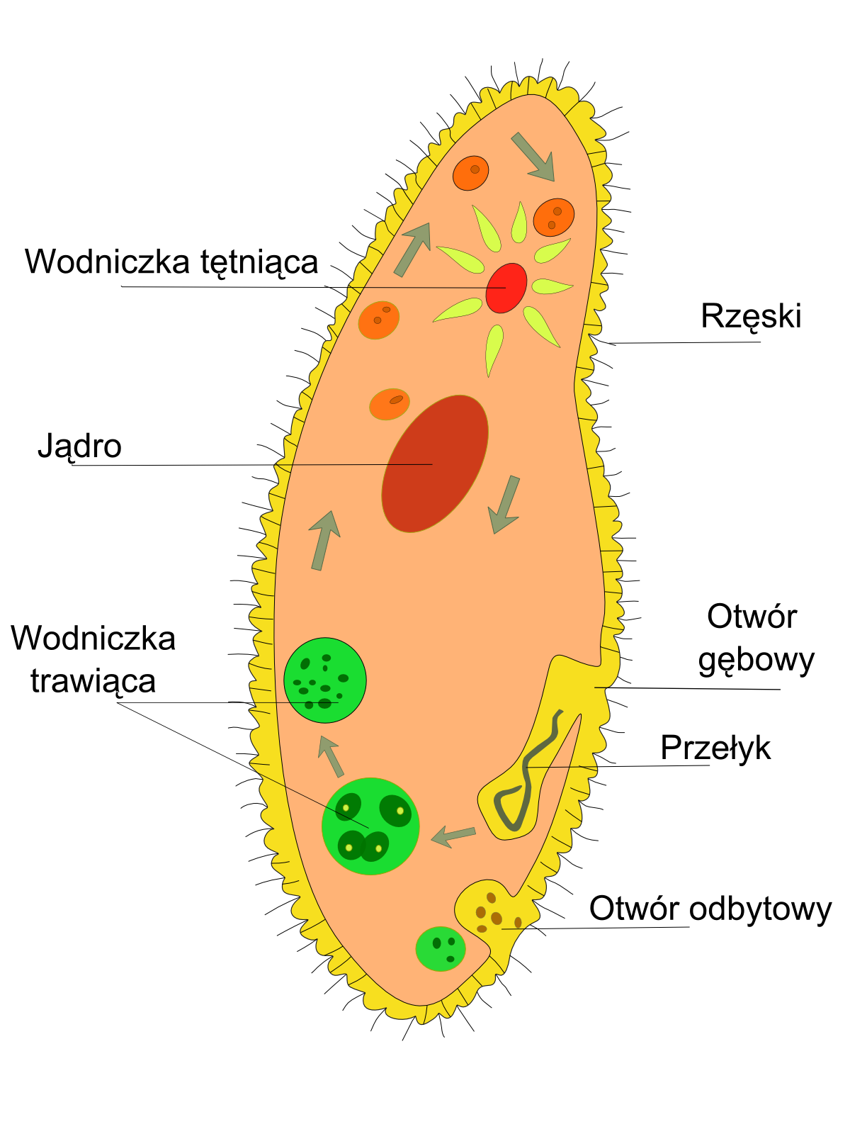 Pantofelek (Paramecium, Protista)